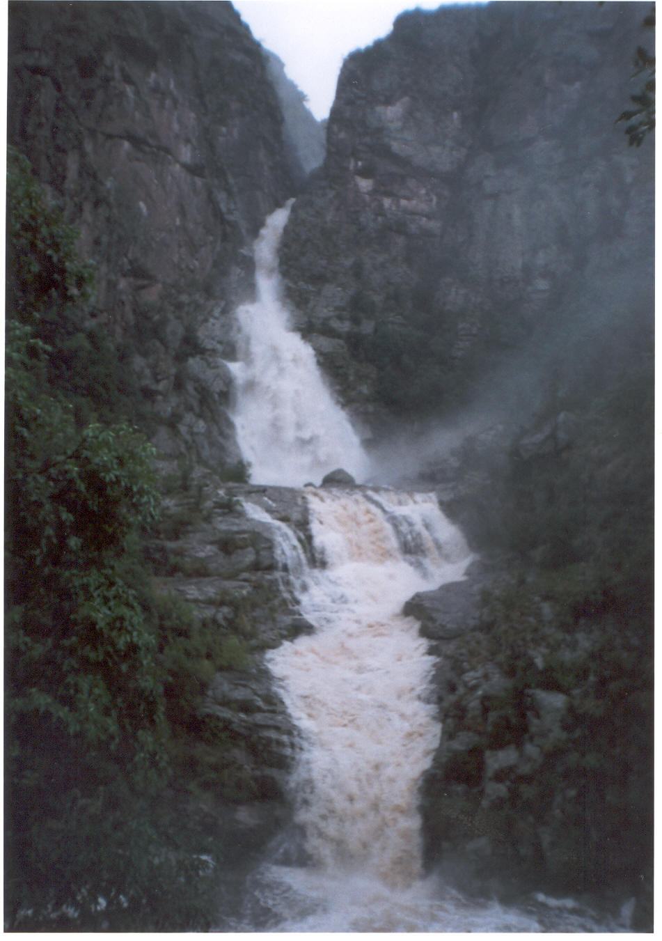 Cascada Los Chorrillos en Tanti - Córdoba - Argentina , crecida